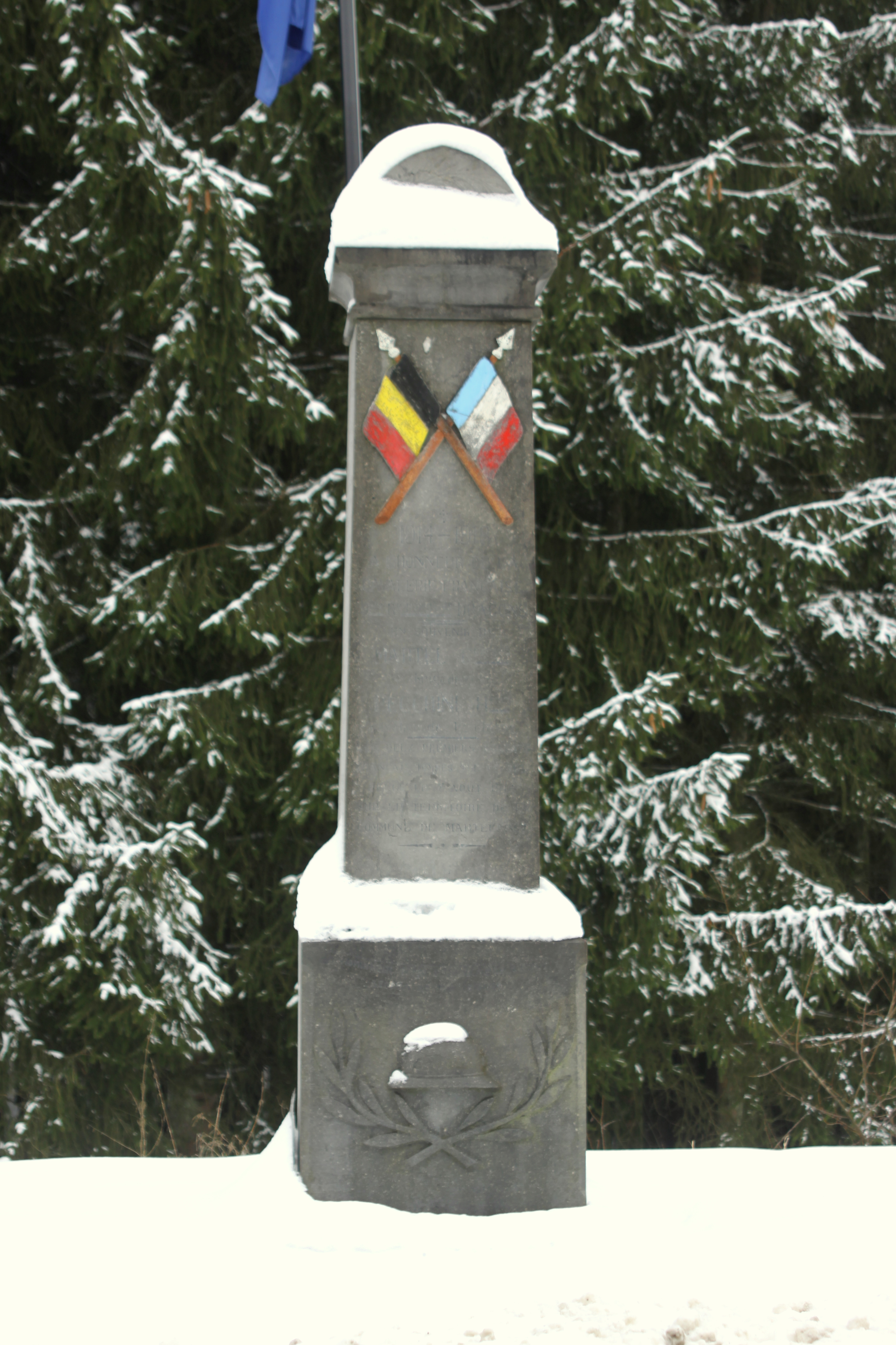 Fransousemonument zu Maartel